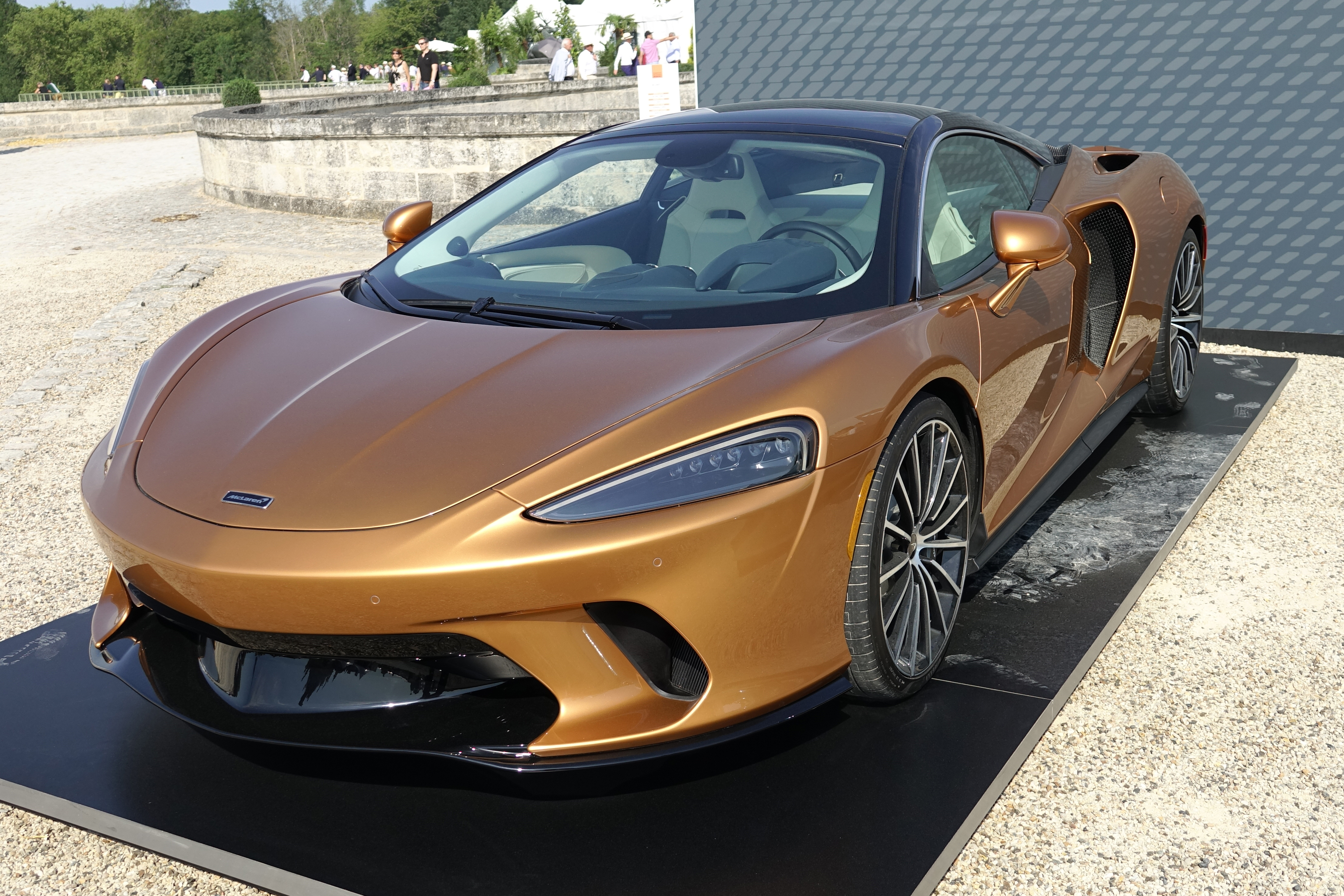 McLaren GT (Gran Tourer) au Chantilly Arts & Elegance Richard Mille 2019